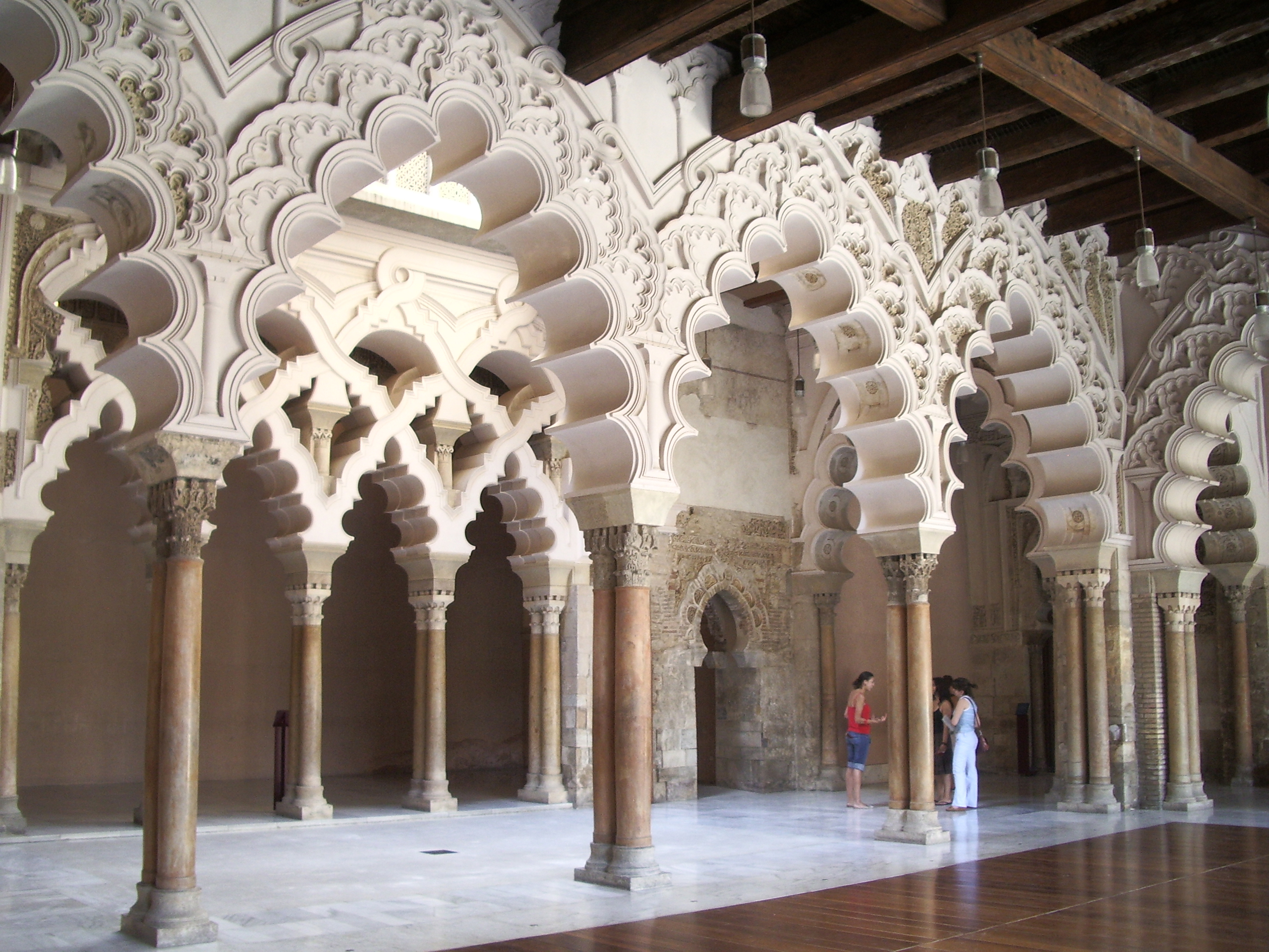 Estancias testero norte aljaferia